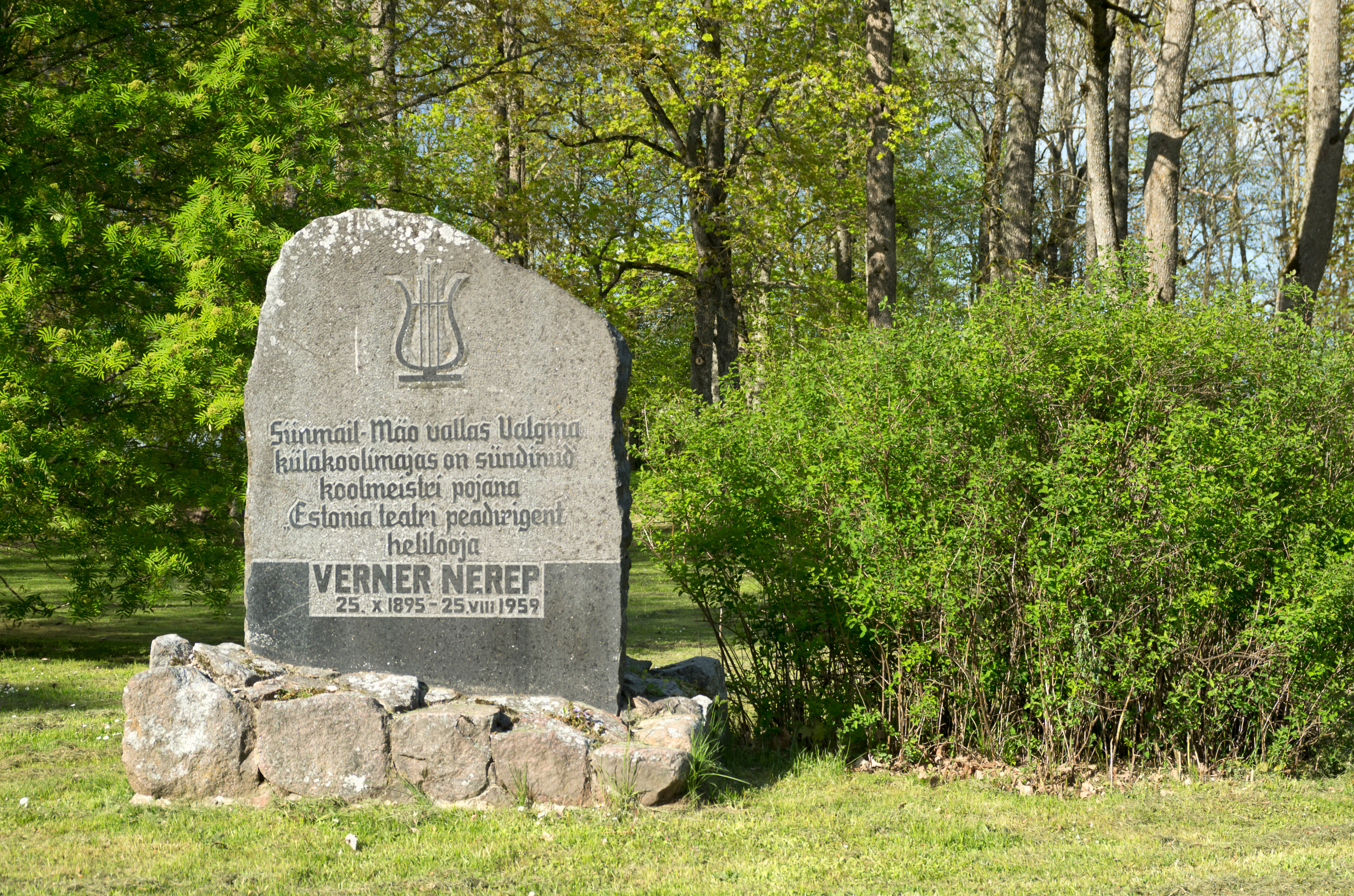 Verner Nerepi mälestuskivi Sargvere pargis